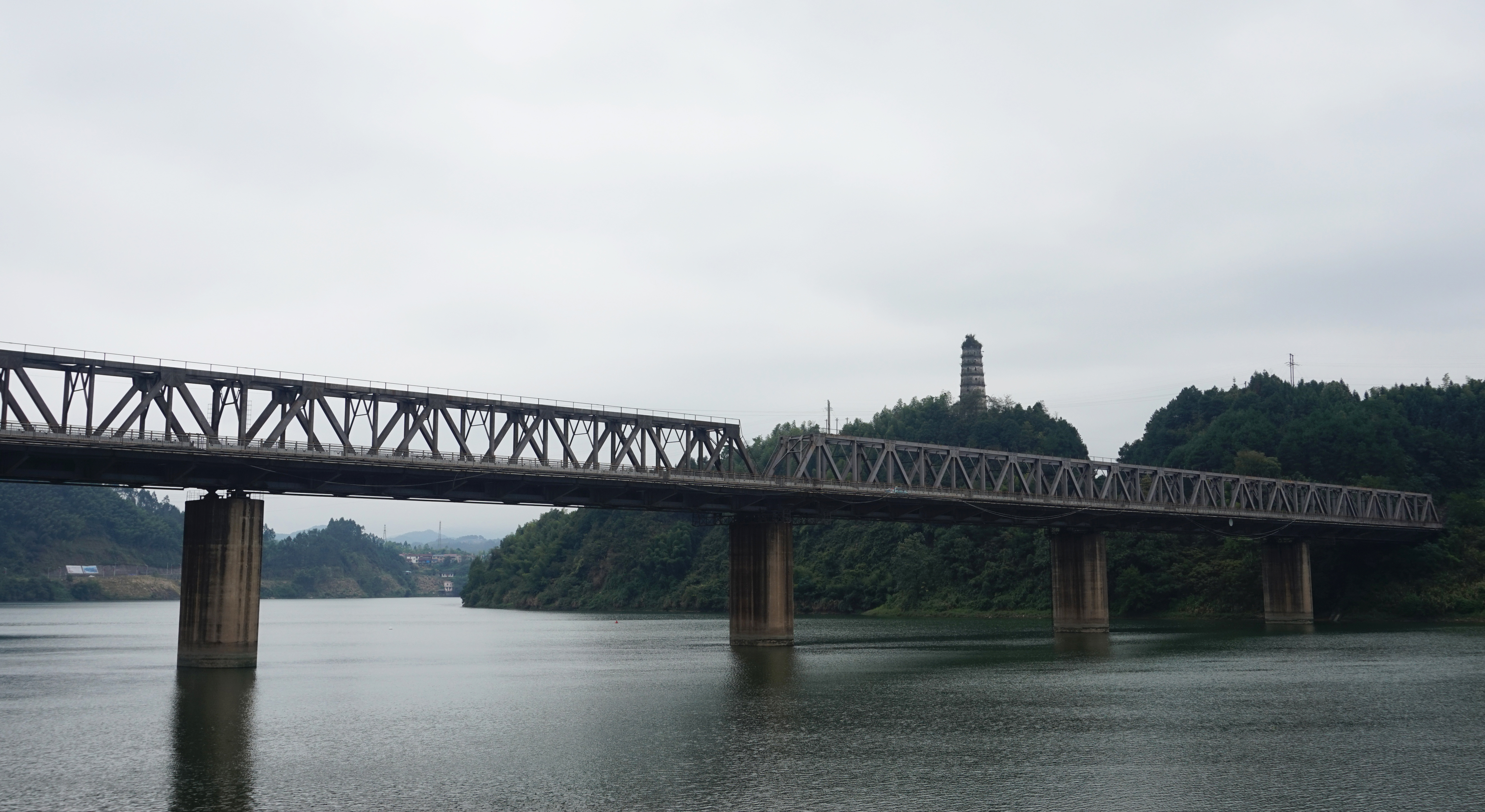 黔城外赤峰塔，建于清咸丰九年（1859）。下为焦柳铁路黔城沅江大桥，1975年建成。